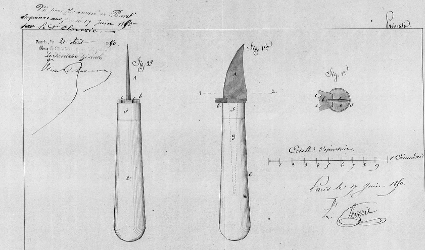 Reproduction brevet du premier ouvre-boites 1850